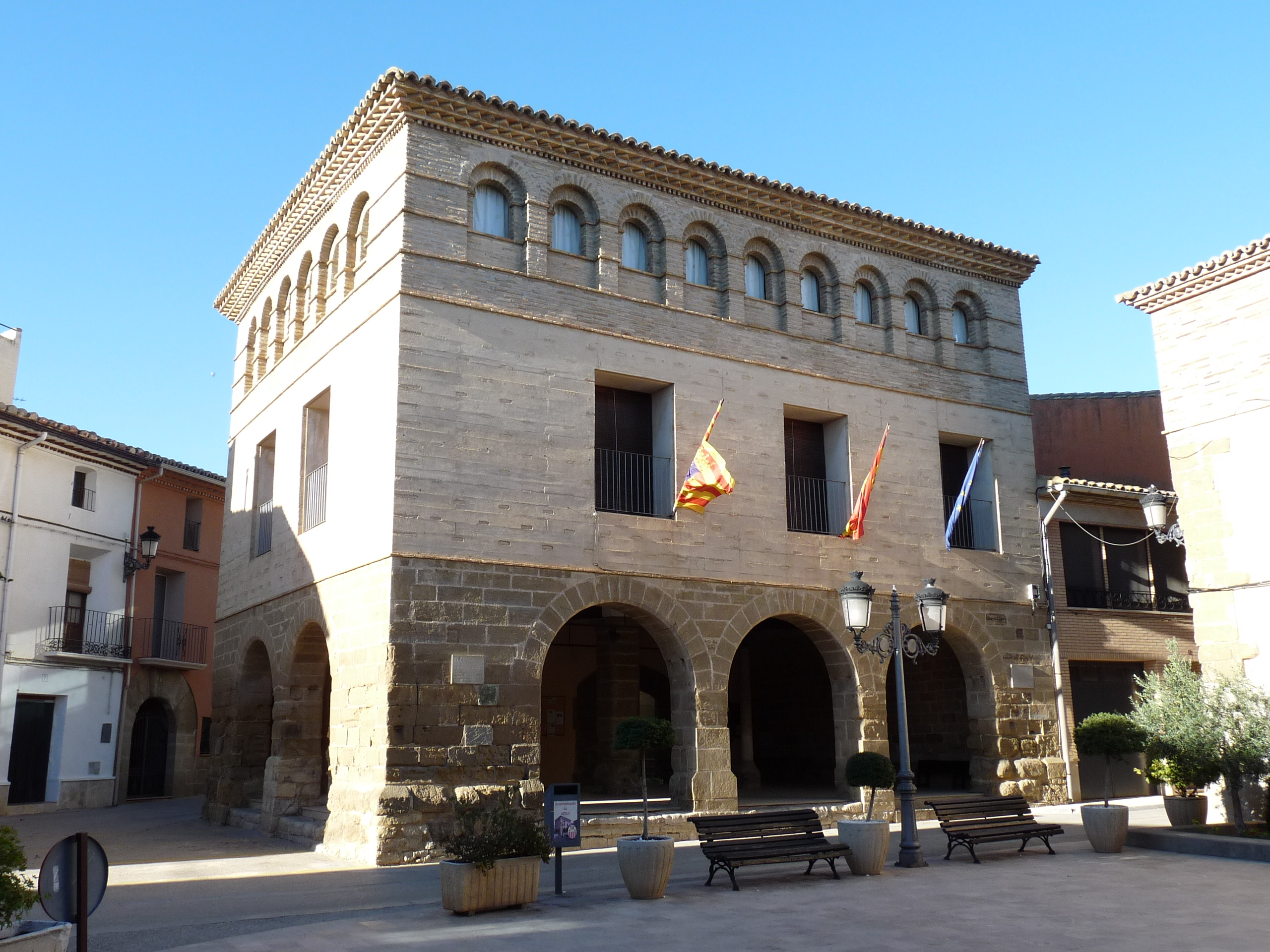 Sena - Ayuntamiento (1550-1575)